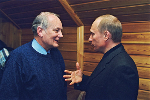 ИРКУТСКАЯ ОБЛАСТЬ, БАЙКАЛЬСК. На встрече с российскими учеными и специалистами. С директором Института российской истории Российской академии наук, членом-корреспондентом РАН Андреем Сахаровым.